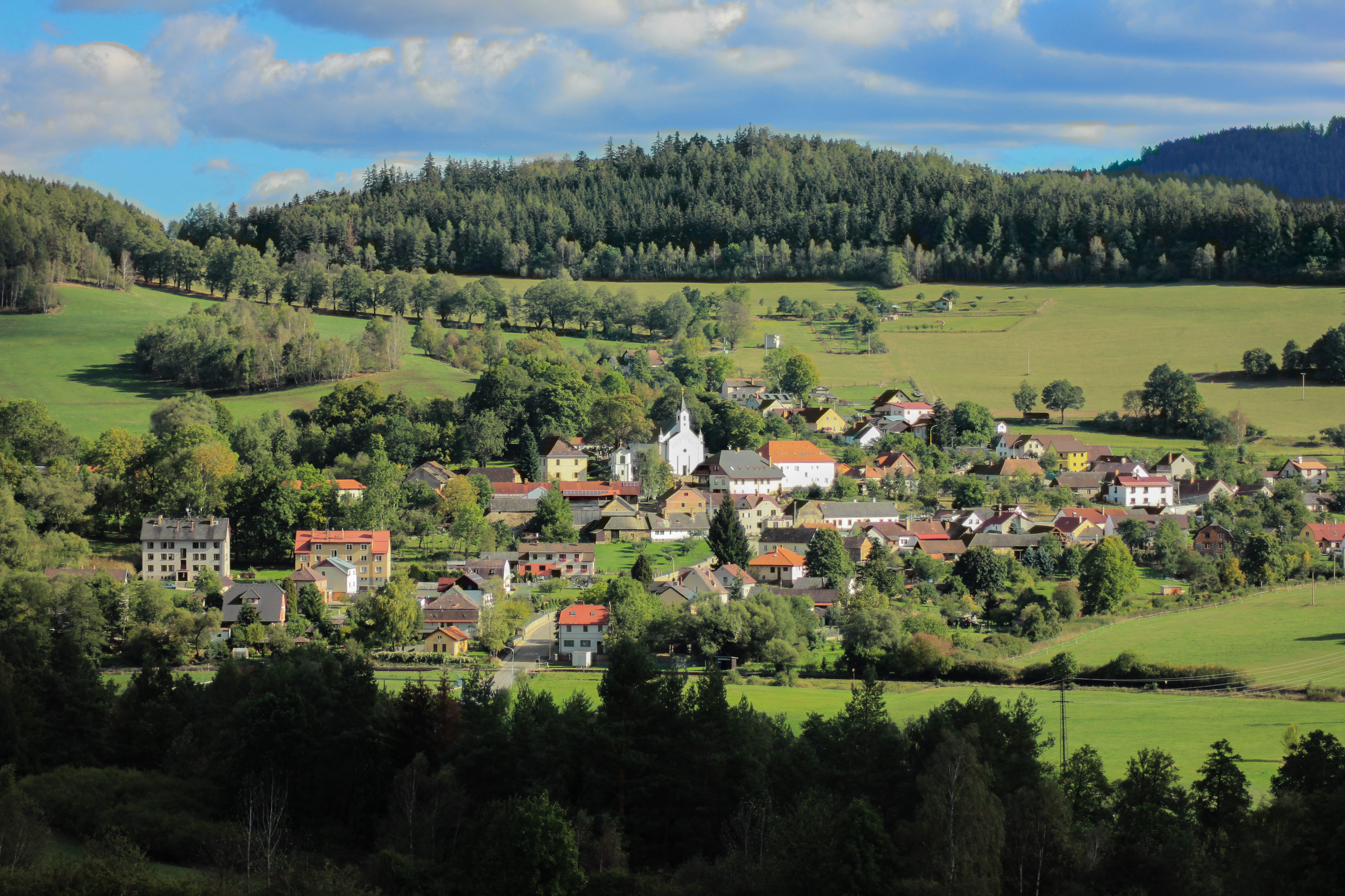 Bohumilice z Chumov